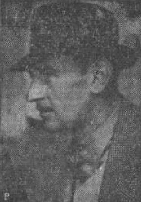 Zdeněk Gina Hašler (1909-1972), český herec a režisér